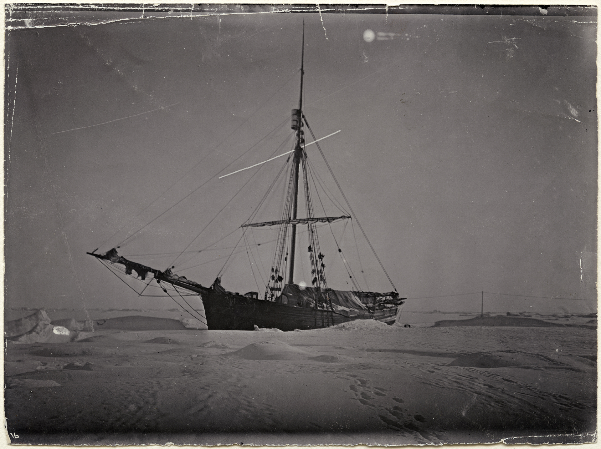 Tittel / Title: "Gjøa" innefrosset ved King Point, 1905/06 Motiv / Motif: Bildet er tatt i måneskinn. Presenningen som er spent over dekket danner et såkalt vintertak. Dato / Date: 1905/06 Fotograf / Photographer: ukjent / unknown Sted / Place: Canada, King Point Eier / Owner Institution: Nasjonalbiblioteket / National Library of Norway Lenke / Link: Bildesignatur / Image Number: bldsa_NPRA1174